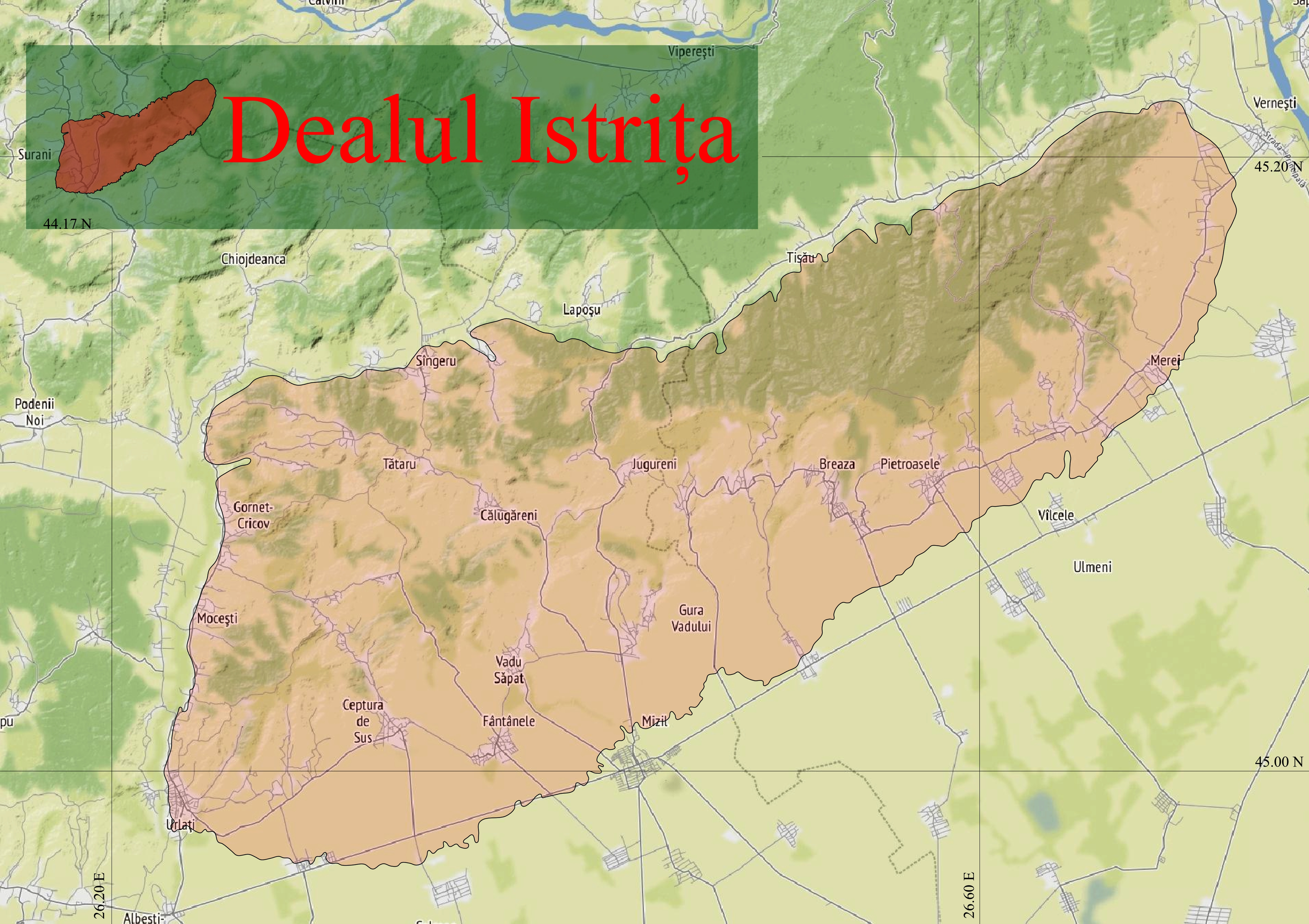 Arealul dealulurilor Istriței - România. Coordonate: 45.25 N 44.95 S 26.15 W 26.75 E. Imaginea poate fi folosita la geolocalizarea punctelor de interes din acesta zona. Linia externă sudică figurată este cea a curbei de nivel de 125 m, care corespunde aproximativ limitei geologice acoperită până la – în medie curba de nivel de 200 m, de depozite piemontane.